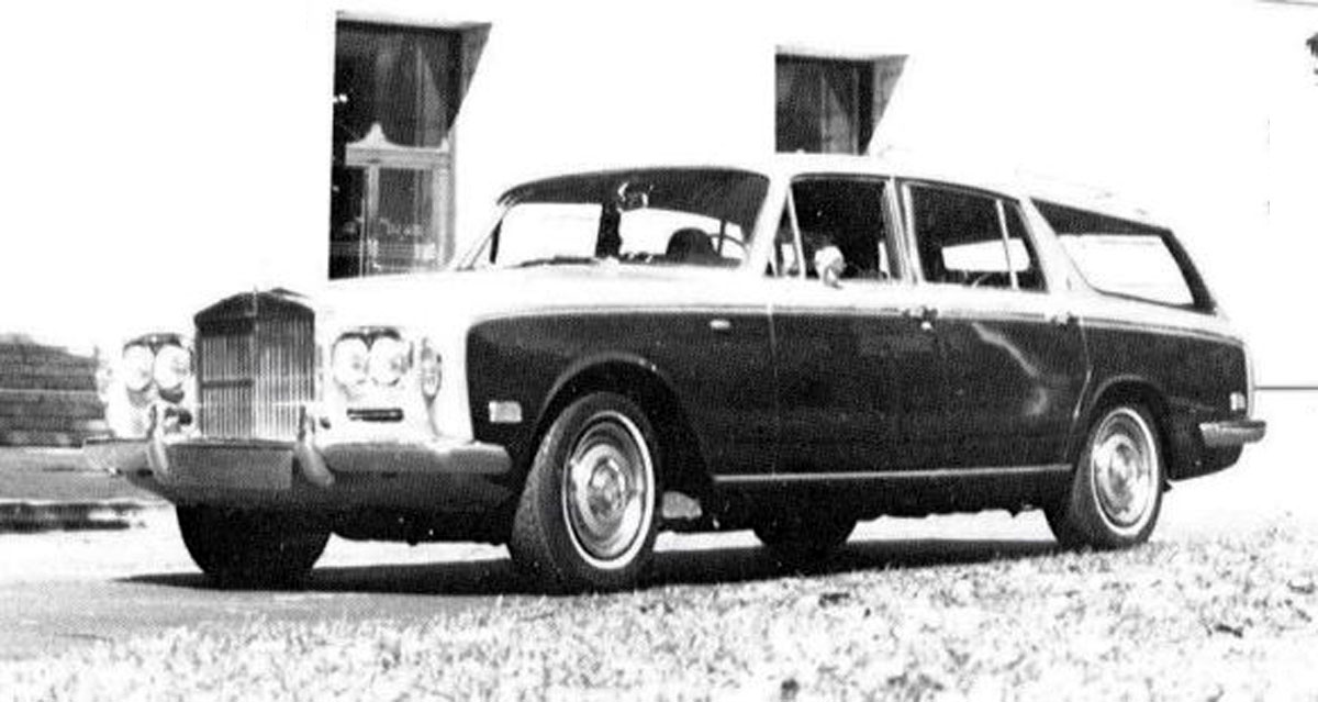 erster gebauter Rolls-Royce Silver Shadow Combi